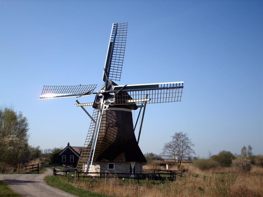 De Gooijer